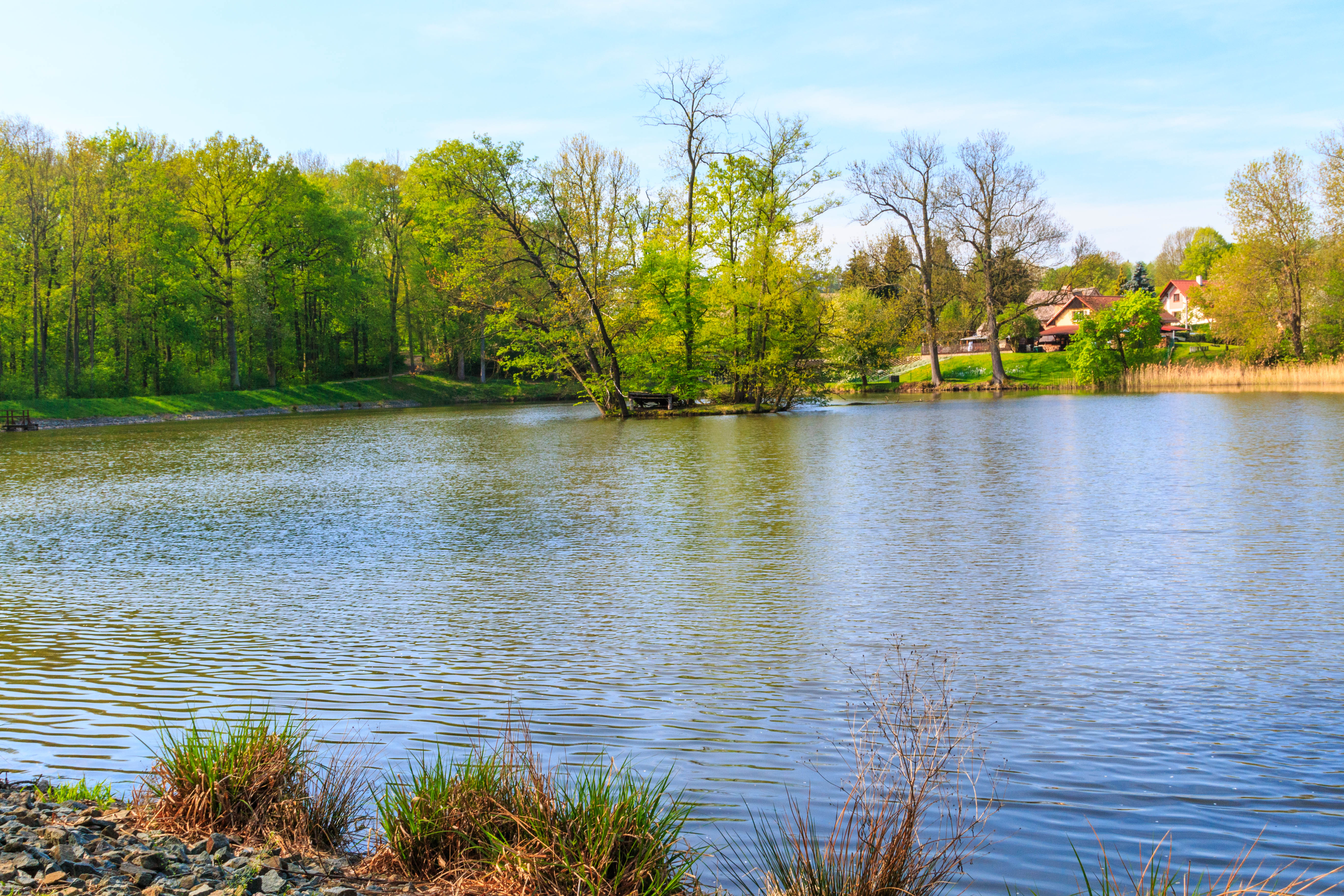 Chrtnický rybník v PR Obora Choltice Project: Vodstvo.